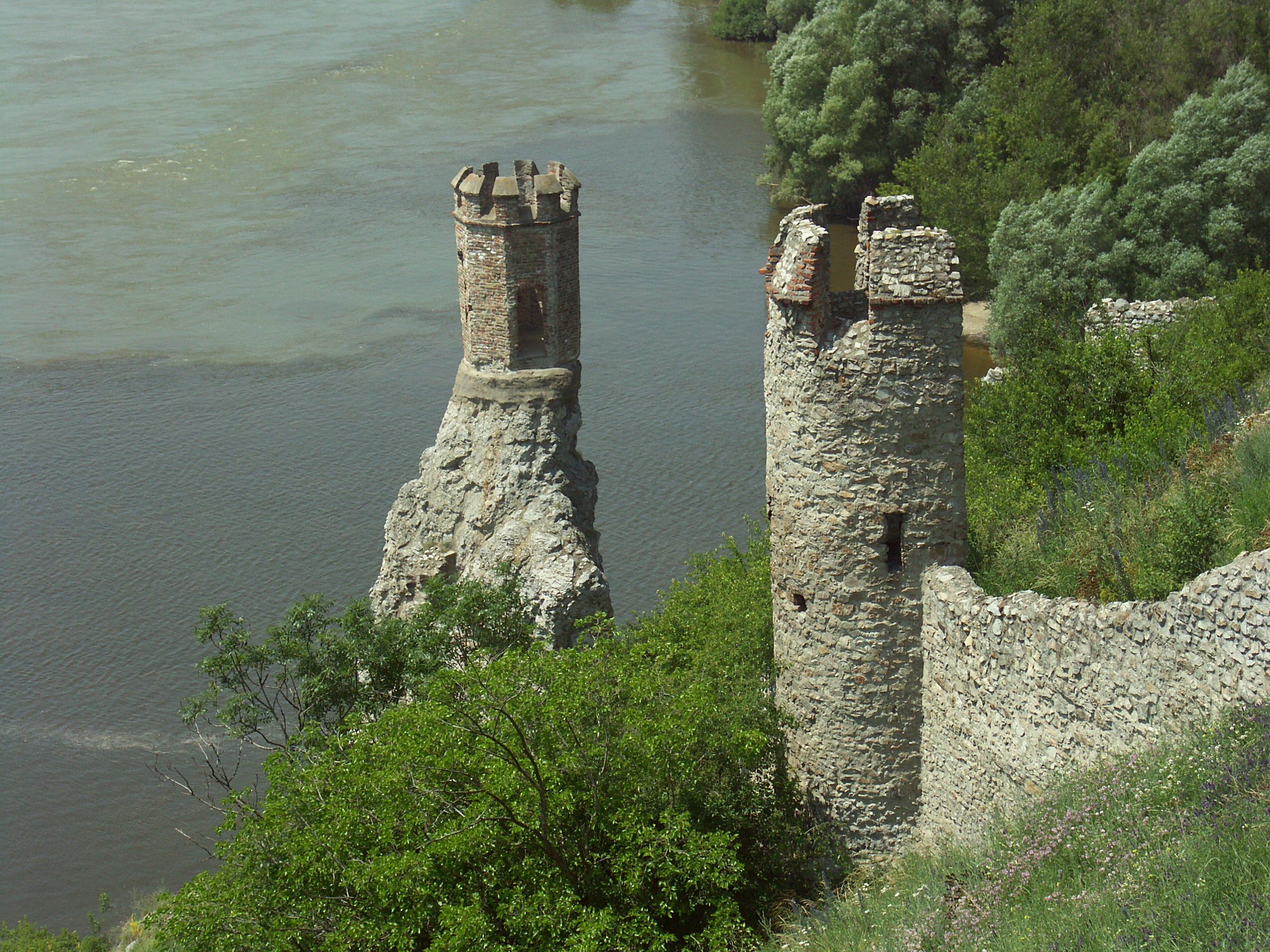 Castle Devín, Bratislava (Devín village), Slovak Republic